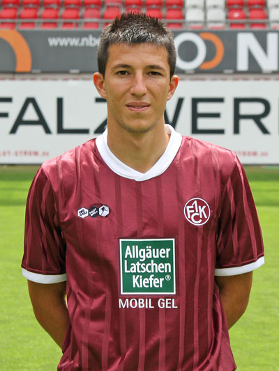 Ilian Micanski, Fußballspieler